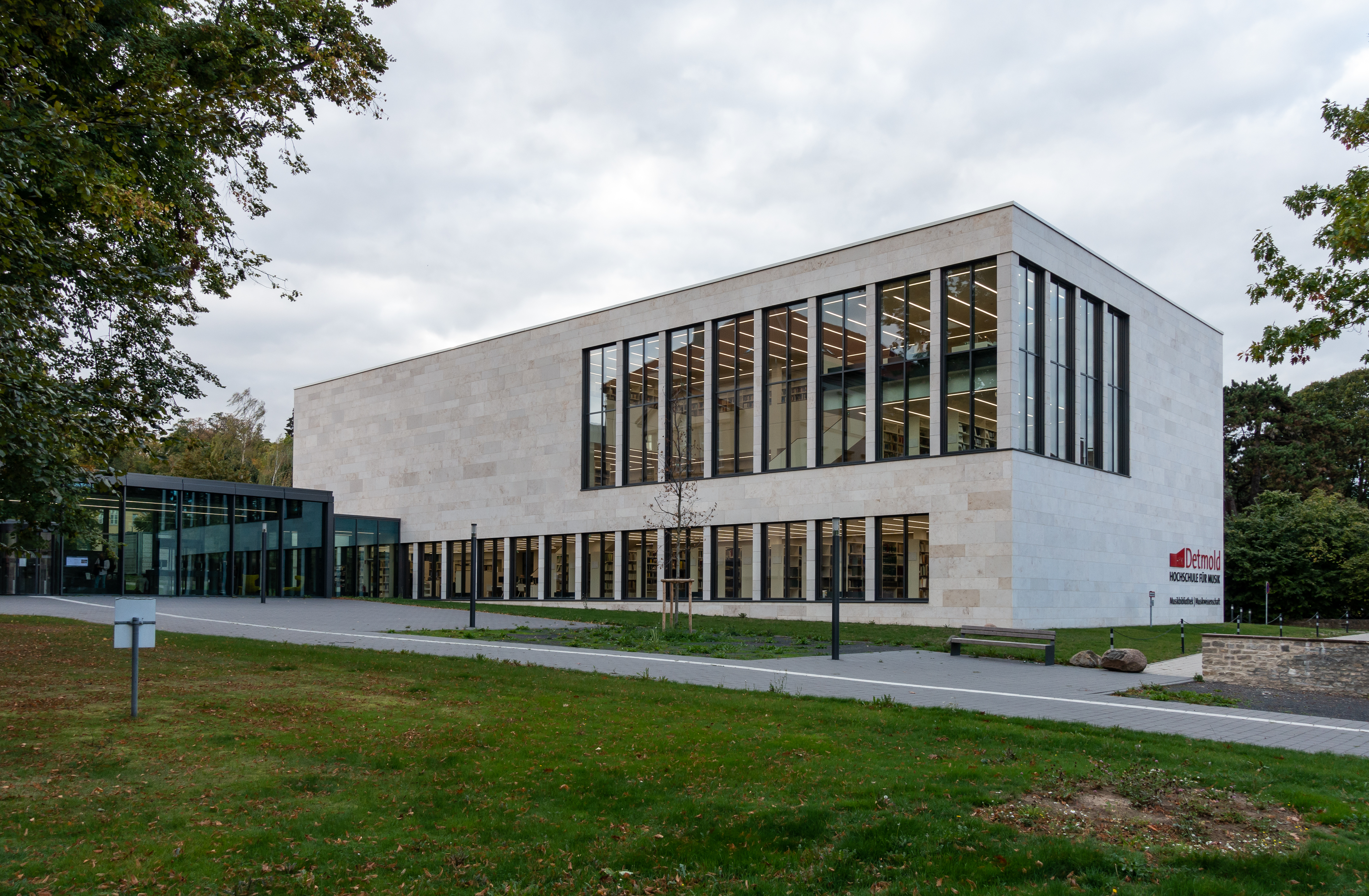 Musikbibliothek der Hochschule für Musik in Detmold als Anbau an die Lippische Landesbibliothek